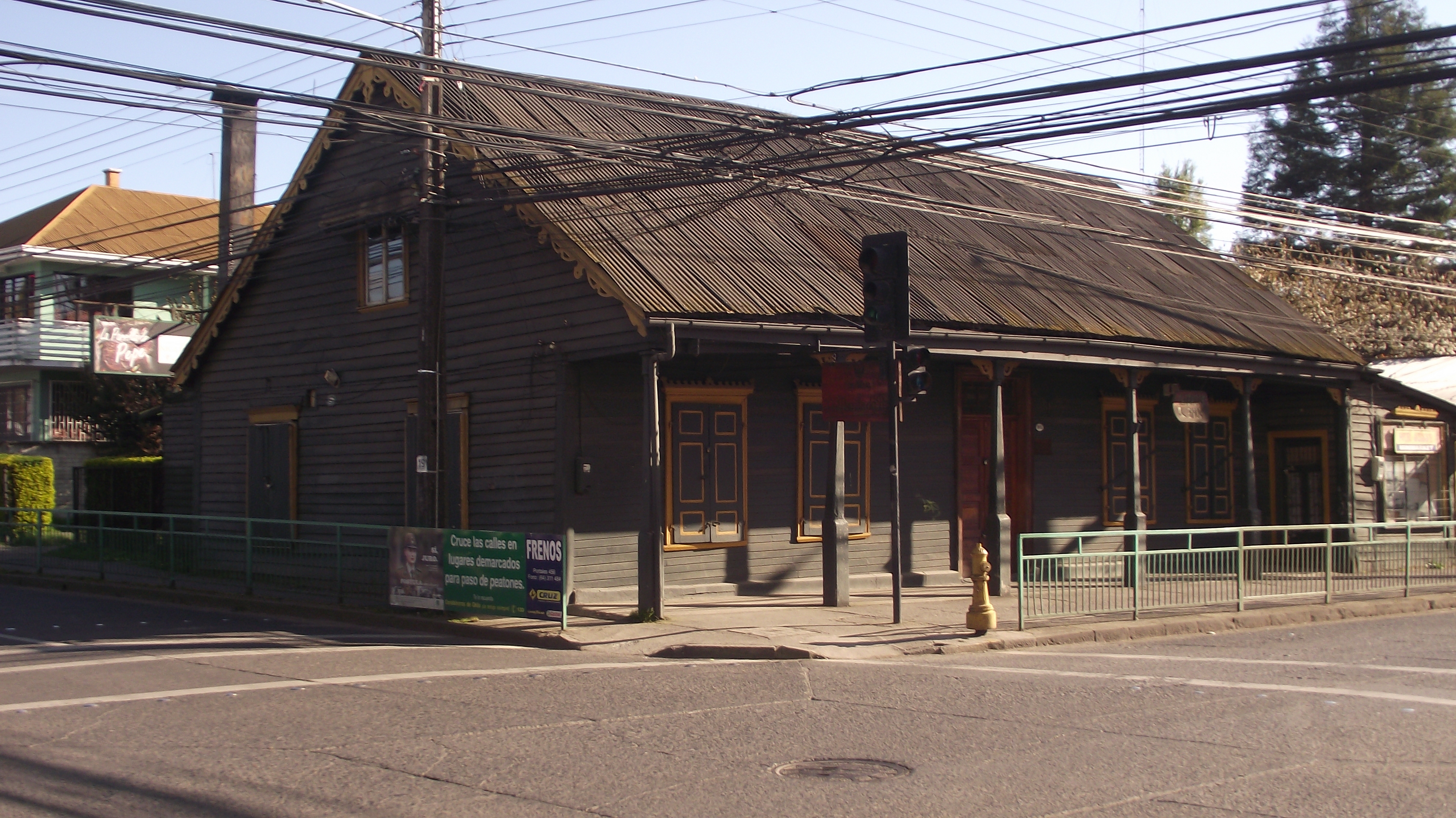 Monumento Nacional Ubicado en Mackenna 1045 Osorno This is a photo of a national monument in Chile: 718